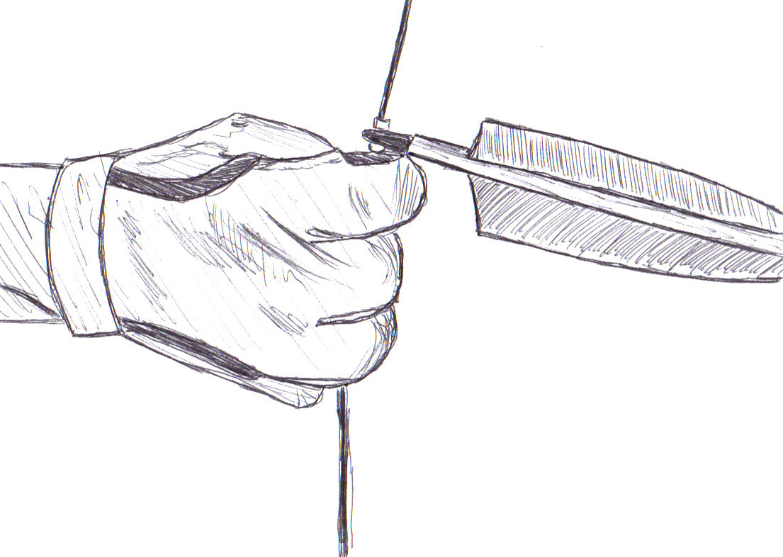 Tiefer Anker